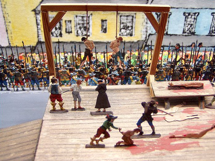 Hinrichtung des Martin Aichinger, genannt Laimbauer. Zinnfigurendiorama aus dem Peuerbacher Bauernkriegsmuseum